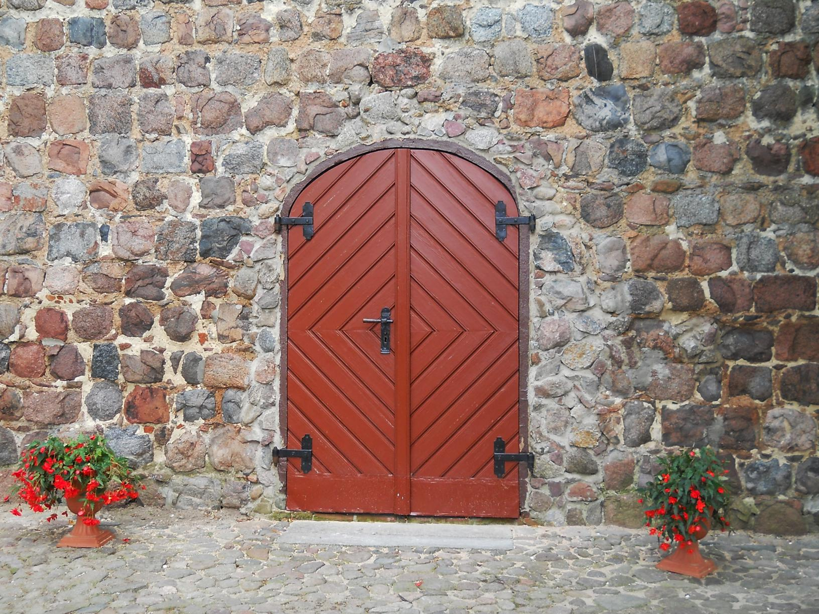 Kościół w Wojcieszycach. Portal w ścianie zachodniej.